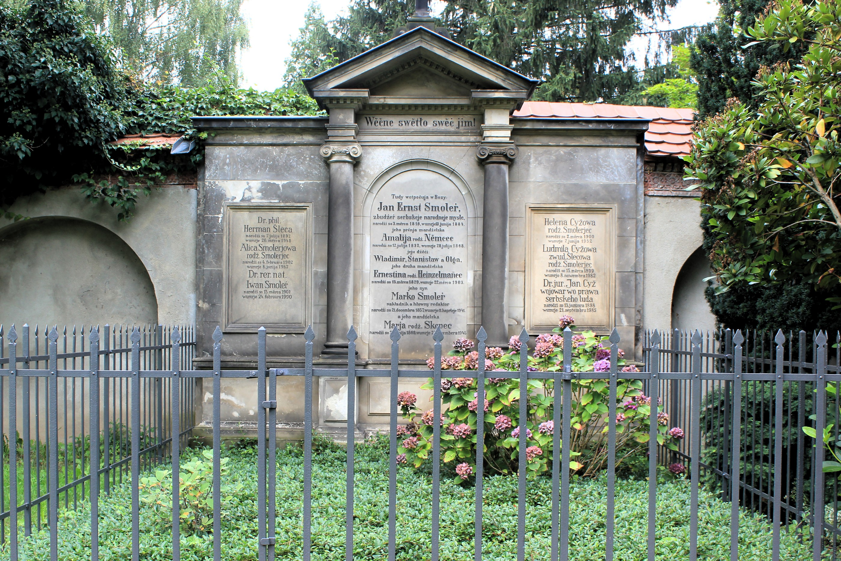 Hornjoserbsce: Smolerjec swójbny row na Budyskim Hrodźišku. Tule wotpočuja Jan Arnošt Smoler, Amalia Smolerjowa, rodź. Němcec, Wladimir, Stanisław a Olga Smolerjec, Ernestine Smolerjowa rodź. Heinzelmannec, Marko Smoler, Marja Smolerjowa rodź. Skopec, Jan Cyž, Helena Cyžowa rodź. Smolerjec, Ludmila Cyžowa rodź. Smolerjec, Herman Šleca, Alica Smolerjowa a Iwan Smoler.